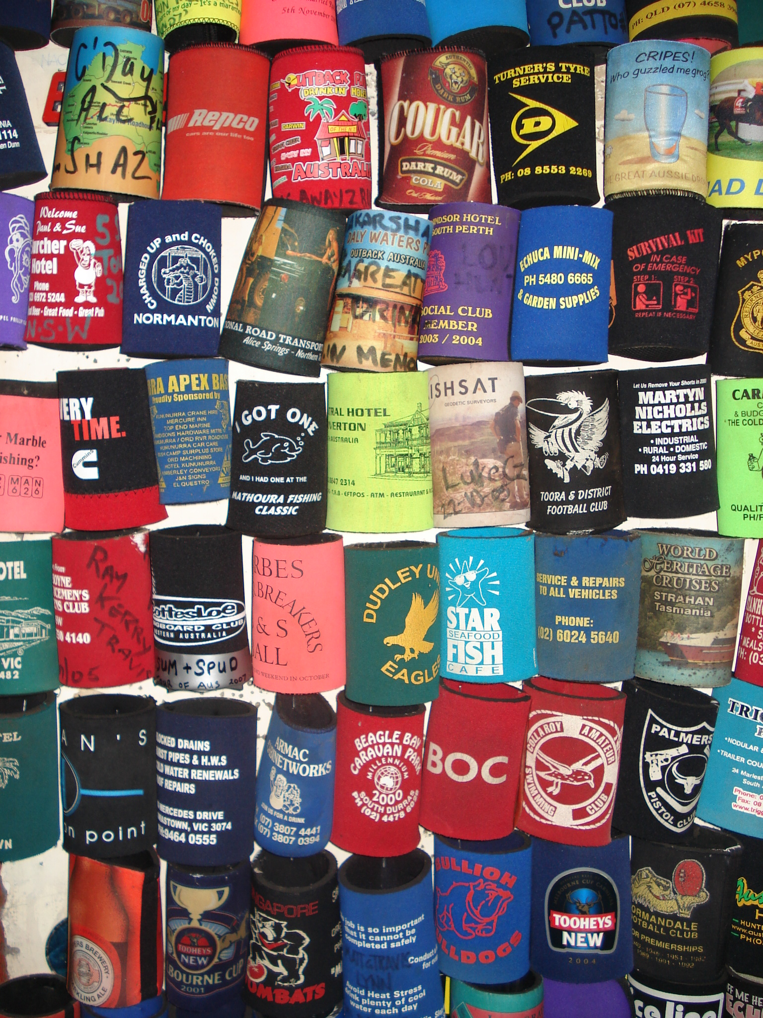 Daily Waters Pub 3